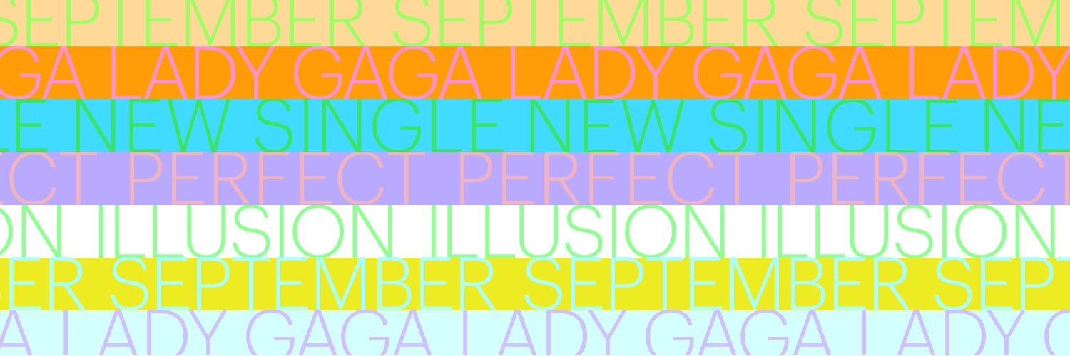 Annonce du nouveau single de Lady Gaga prévu pour septembre 2016.